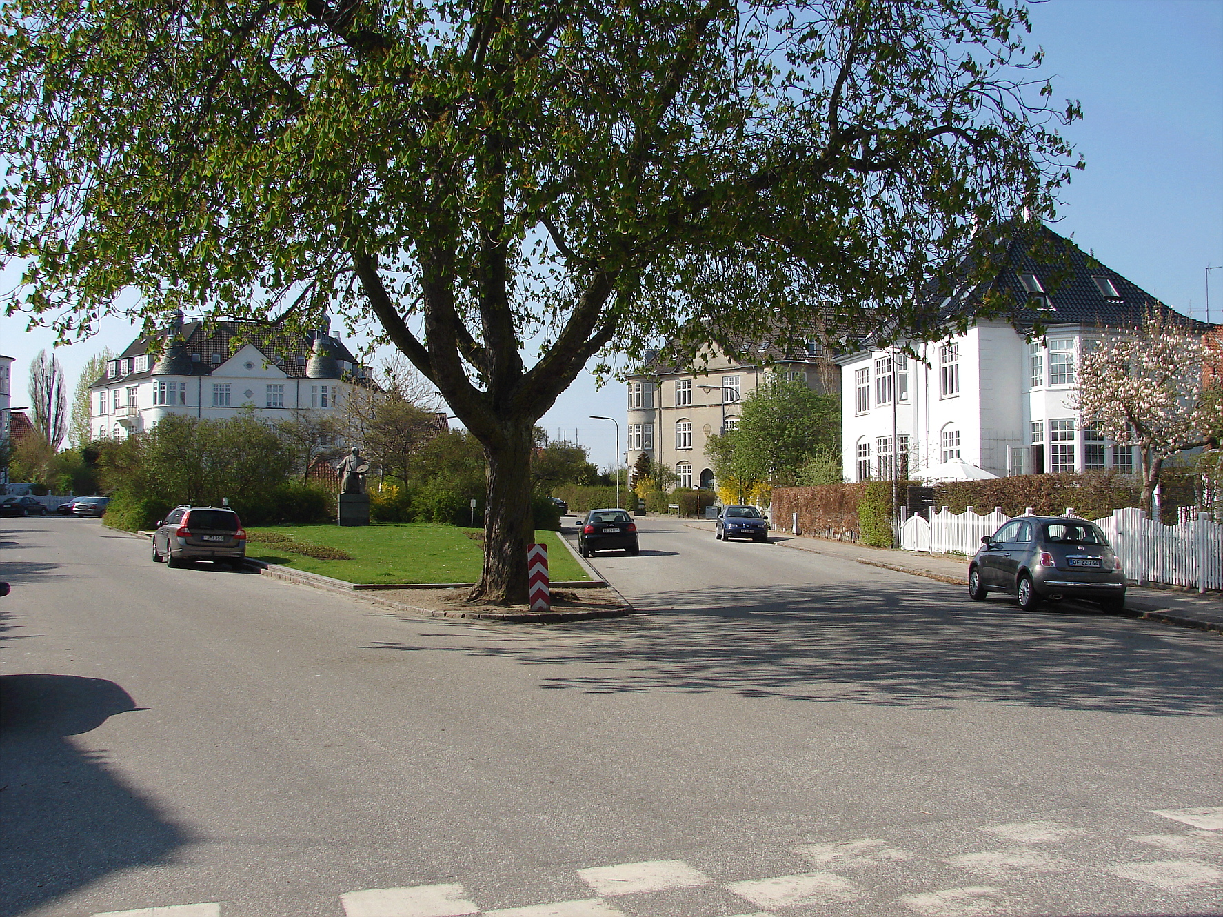 Kristian Zahrtmanns Plads, Frederiksberg, København